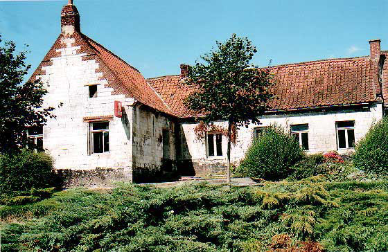 Maison typique de Frevin capelle